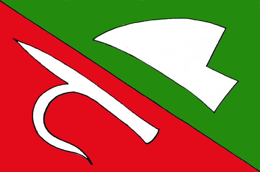 Vlajka obce Senorady